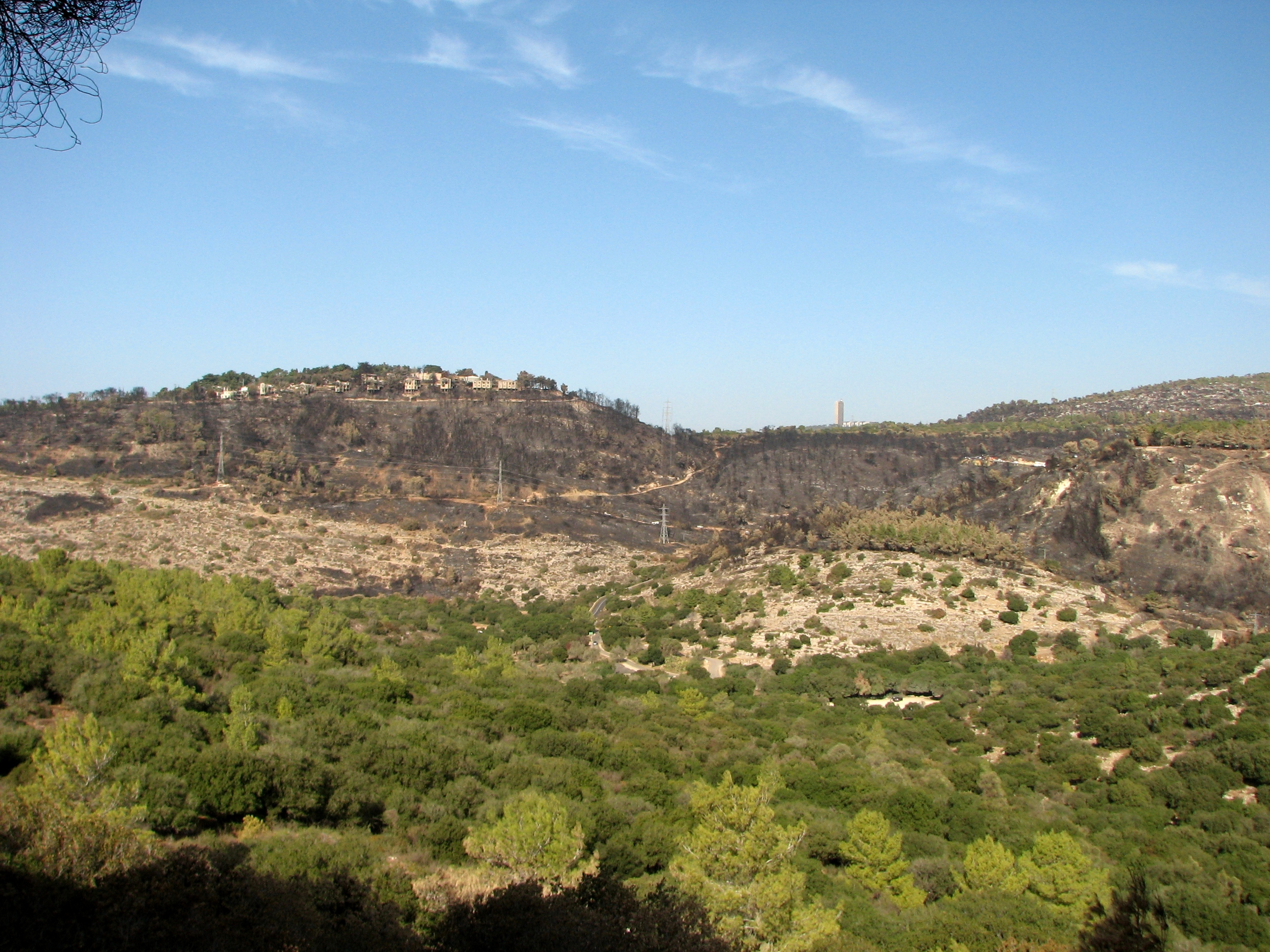 Beit Oren is a kibbutz in northern Israel, located on Mount Caramel. Israel. pictures after 2010 fire בית אורן הוא קיבוץ במרכז רכס הכרמל, בתחום המועצה האזורית חוף הכרמל. תמונות לאתר השריפה של דצמבר 2010